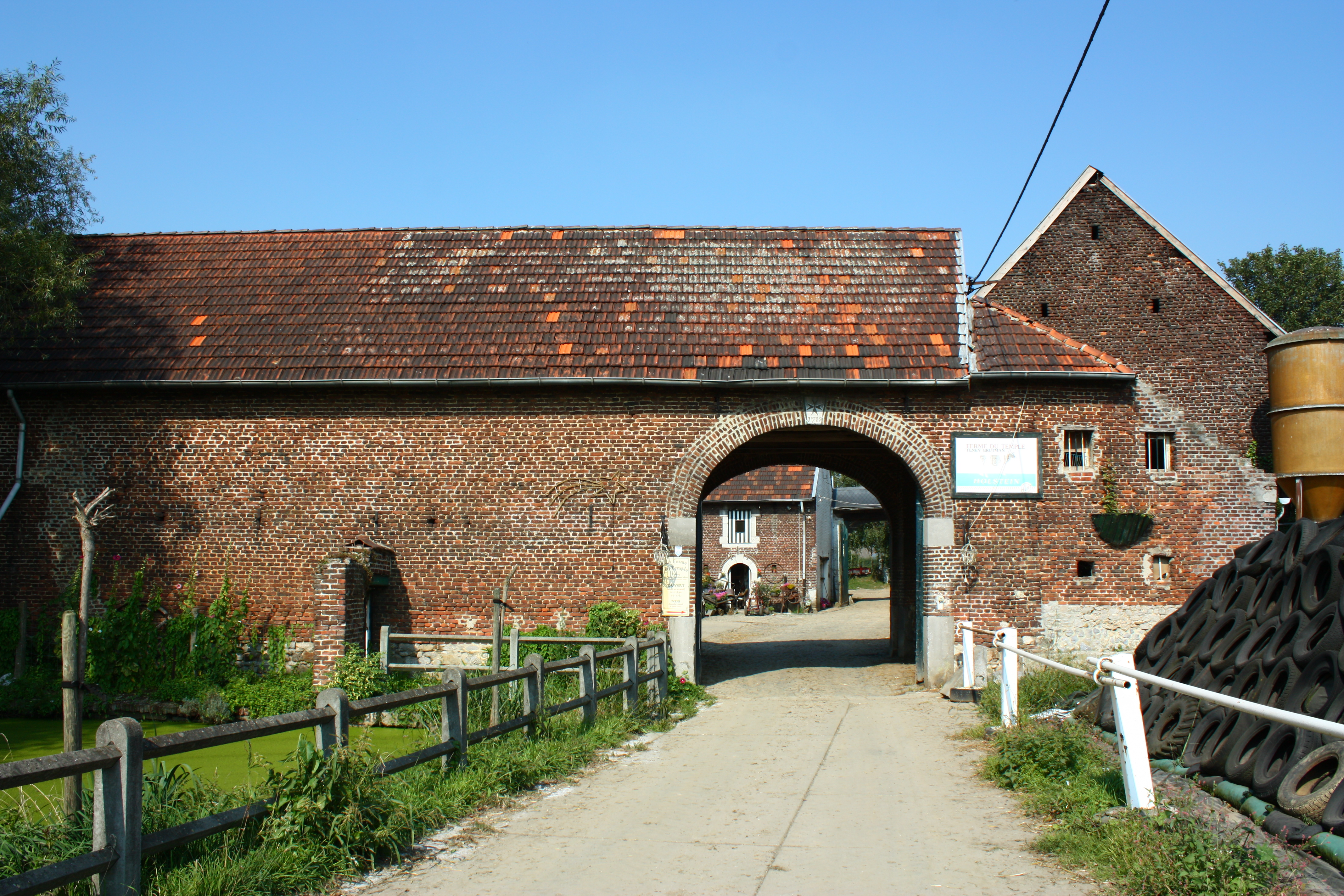 La Ferme du Temple située à Visé, dans la province de Liège, en Belgique. Monument classé n°62108-CLT-0004-01.